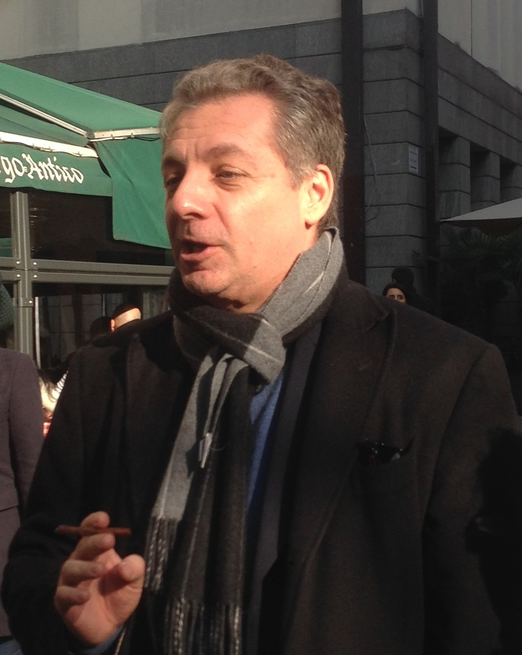 Павел Лазаревич Берман - итальянский скрипач (Милан).